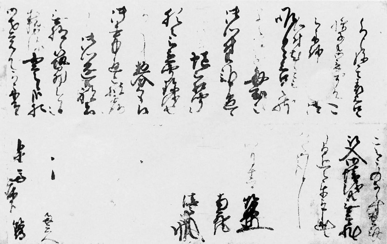 根来寺寺僧連署状